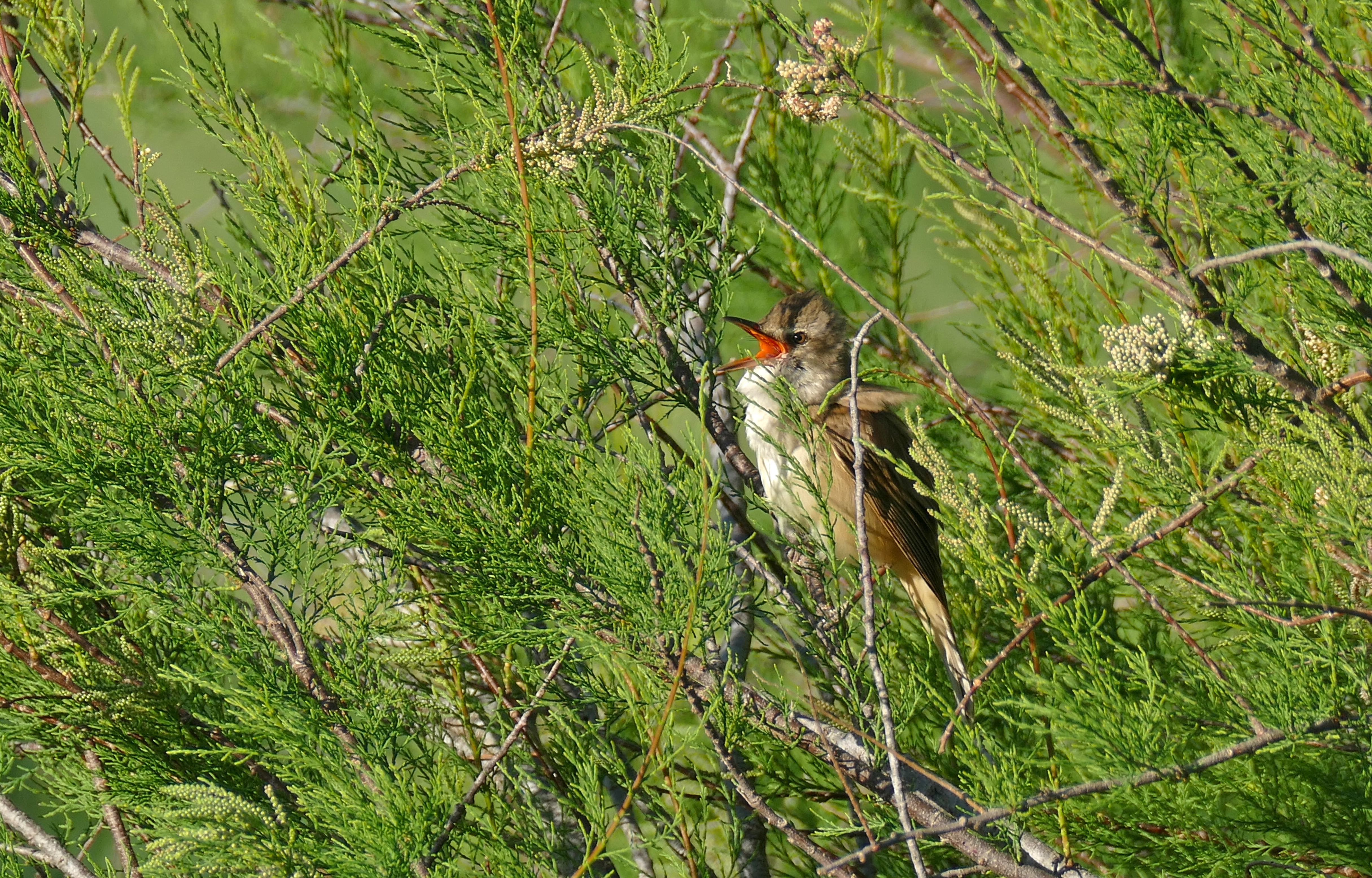 Aguait del Matar, Estanys del Matar, Los Aiguamolls del' Empordà, Castelló d'Empúries, Catalunya, SPAIN